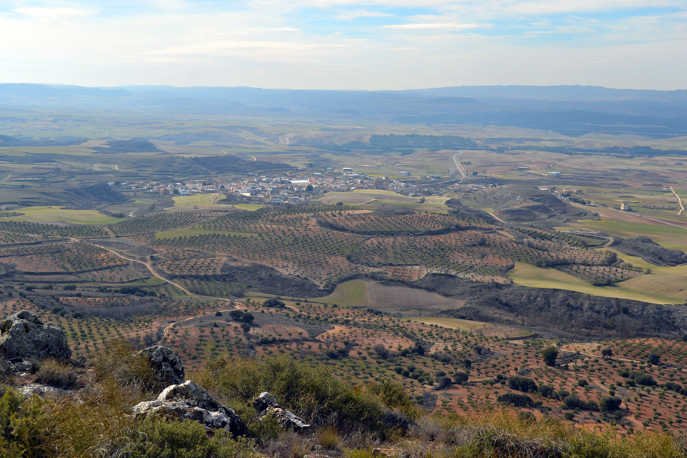 Panorámica de Villalba del Rey (Cuenca) desde el Monte